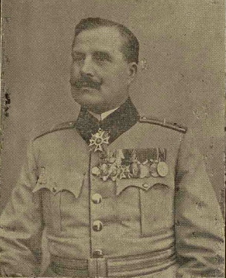 Toma Lișcu (1866-1958), general român.